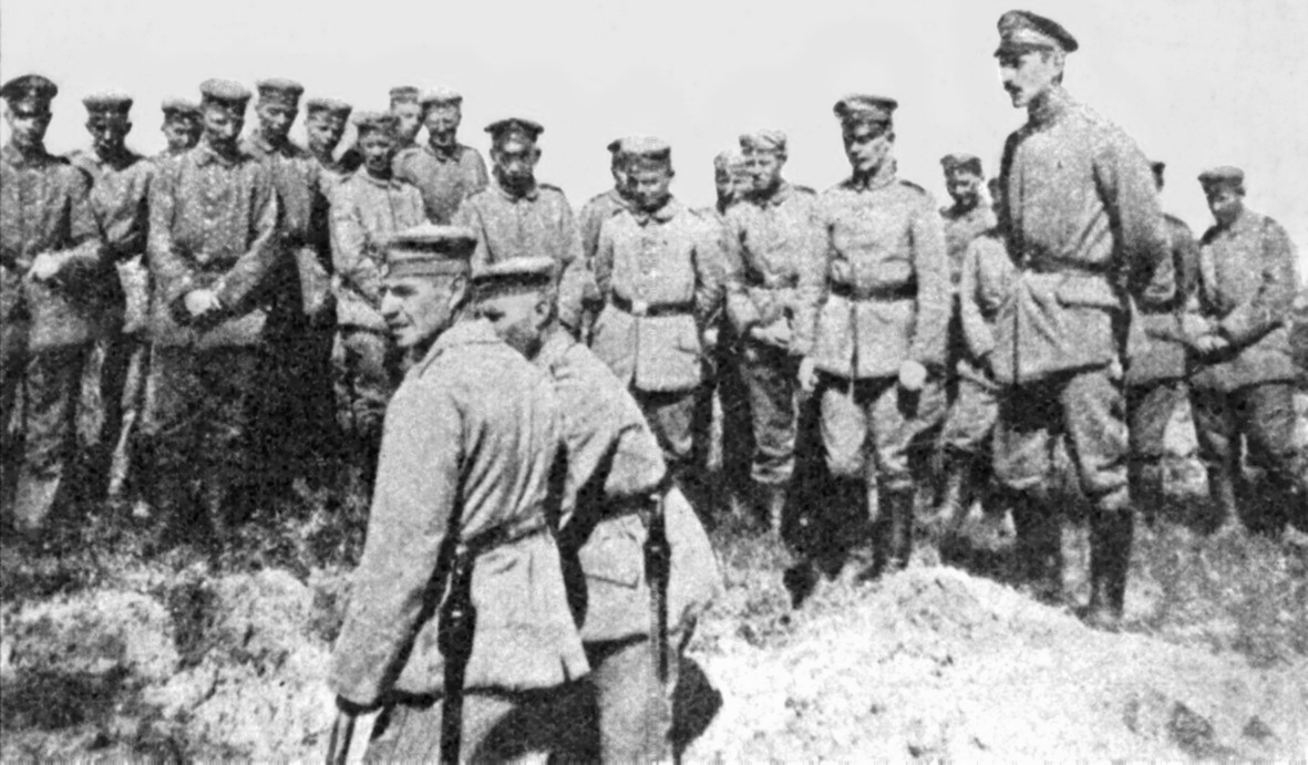 Polangenin kurssilaisia räjäytysharjoituksissa.